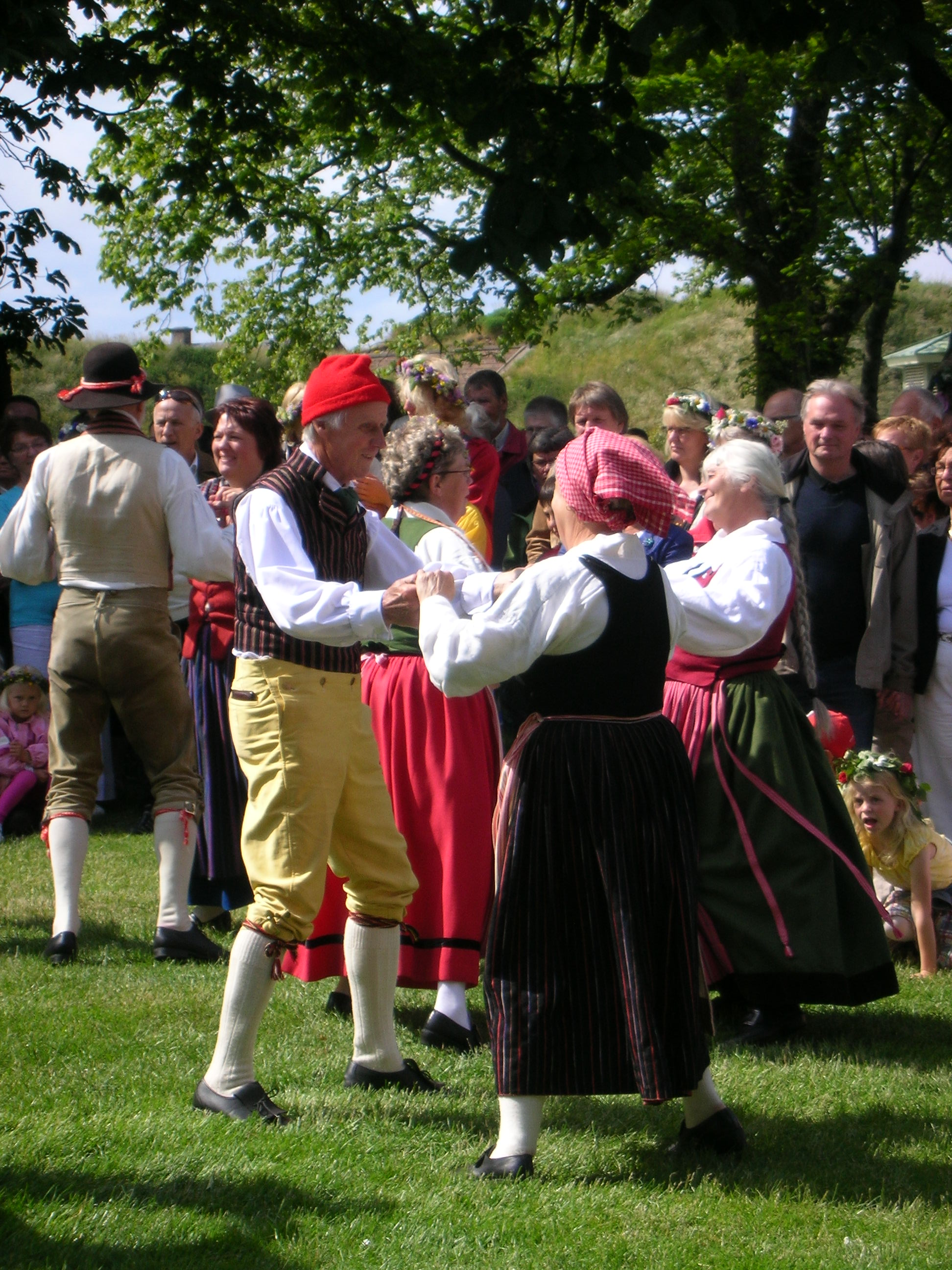 Medlemmar ur hembygdsföreningen Gamla Varberg som bär folkdräkt och håller en uppvisning med traditionella danser vid vid midsommarfirande i Varberg 19 juni 2009.